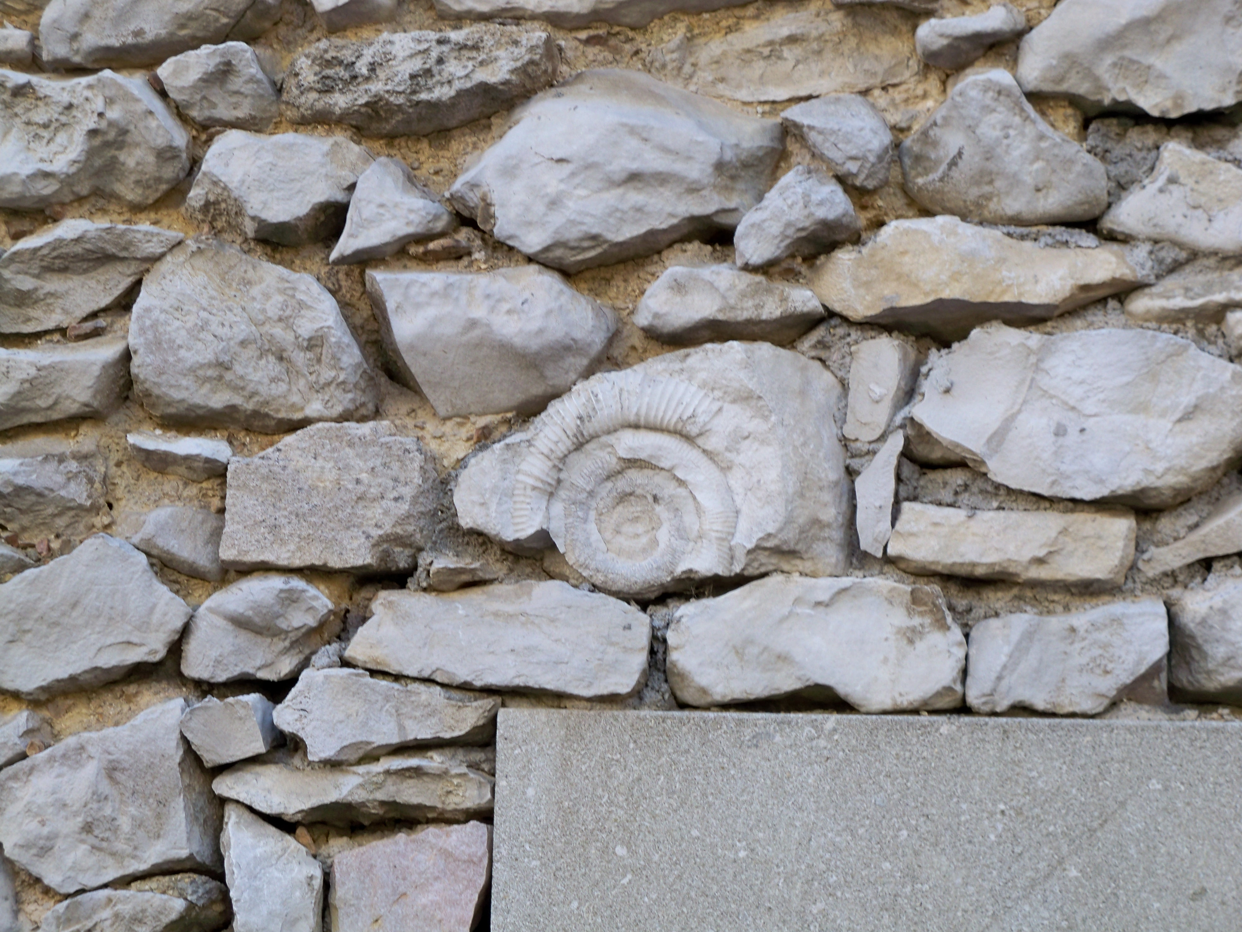 fossile d'amonite incluse dans une pierre murale à Banon (04), France